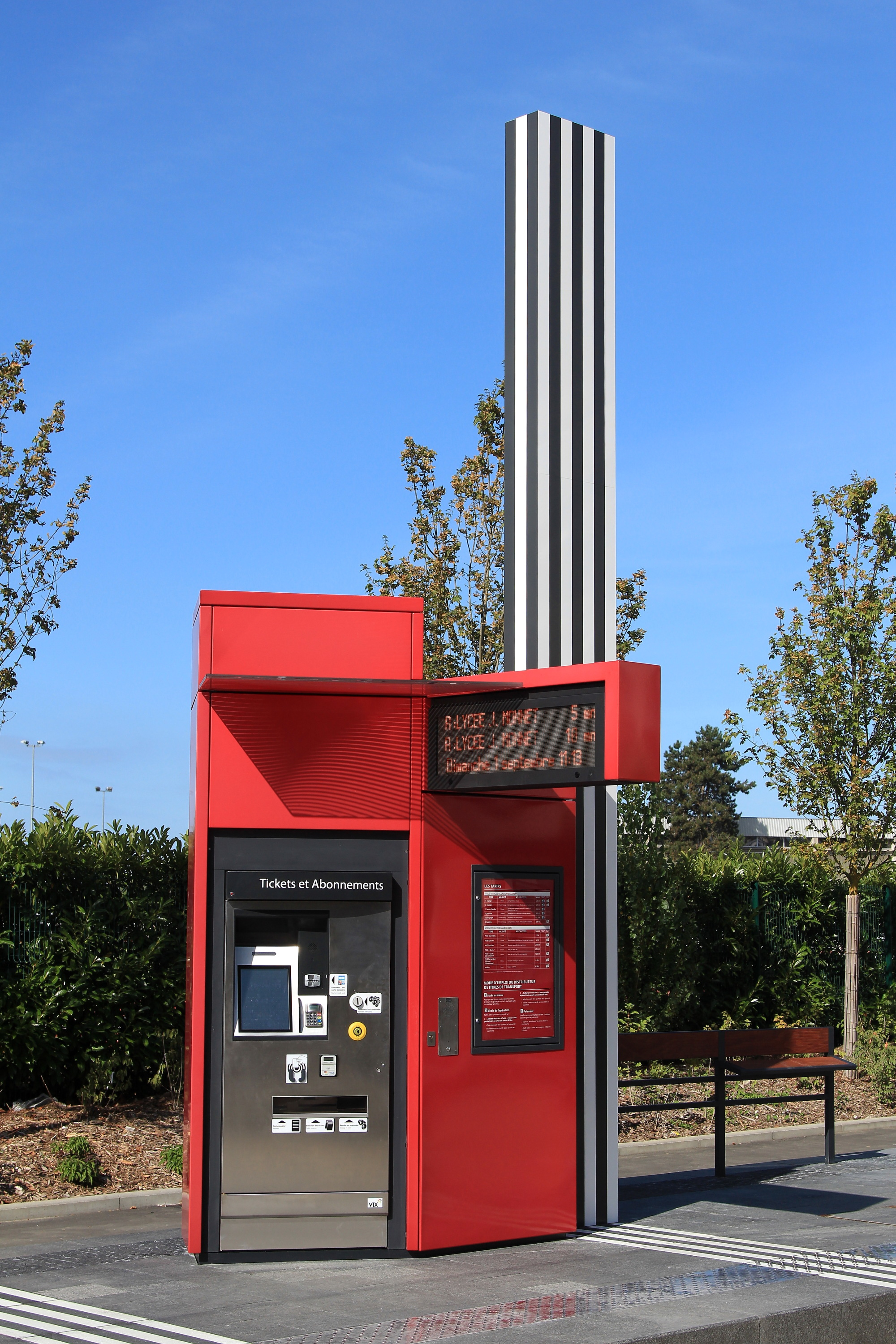 Vue sur le distributeur automatique et l'afficheur en temps réel d'un arrêt du tramway de Tours, avec les colonnes de Buren.